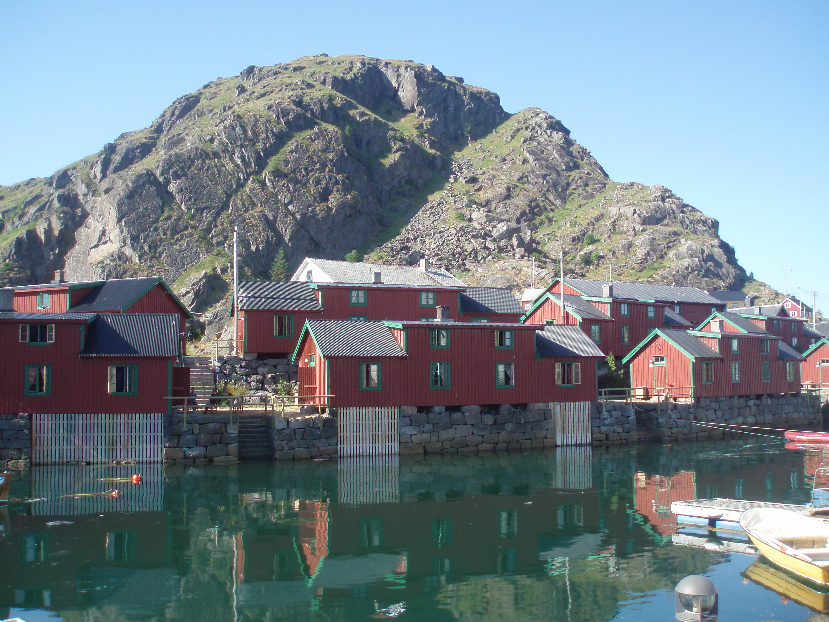 Stamsund in Lofoten